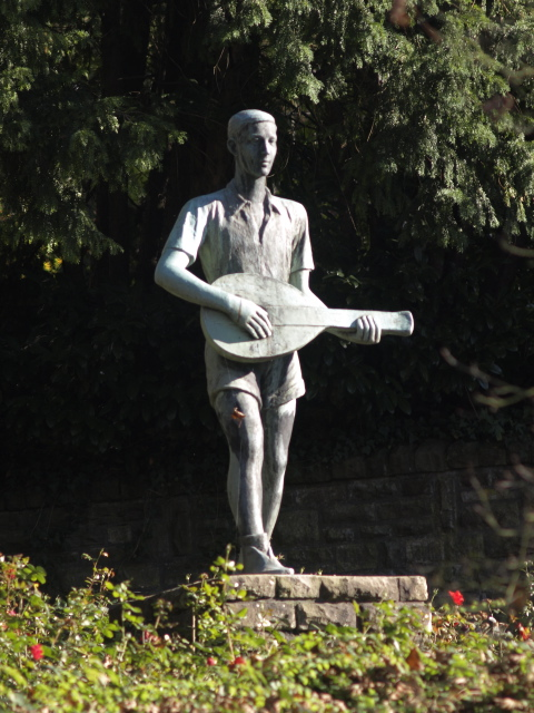 Guitarrenspieler am Sandhof